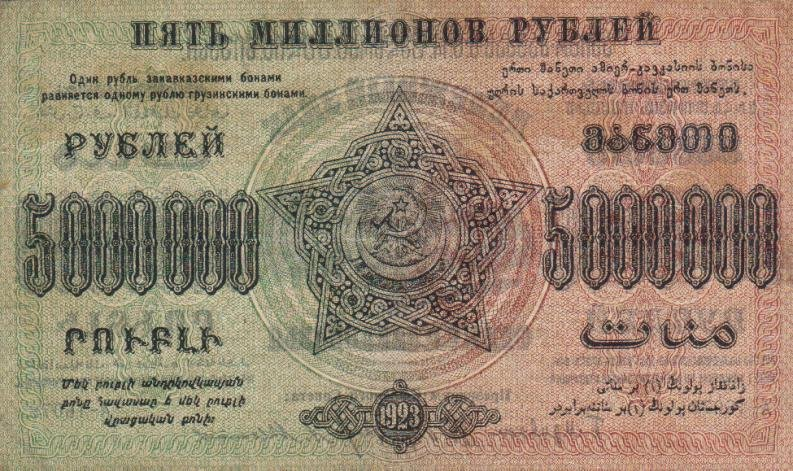 5 000 000 рублей 1923 года. ЗСФСР. Реверс.